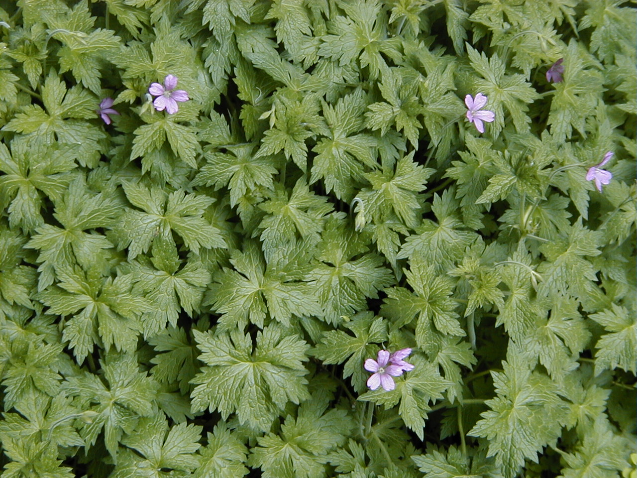 Geranium endressii. Real Jardín Botánico, Madrid.